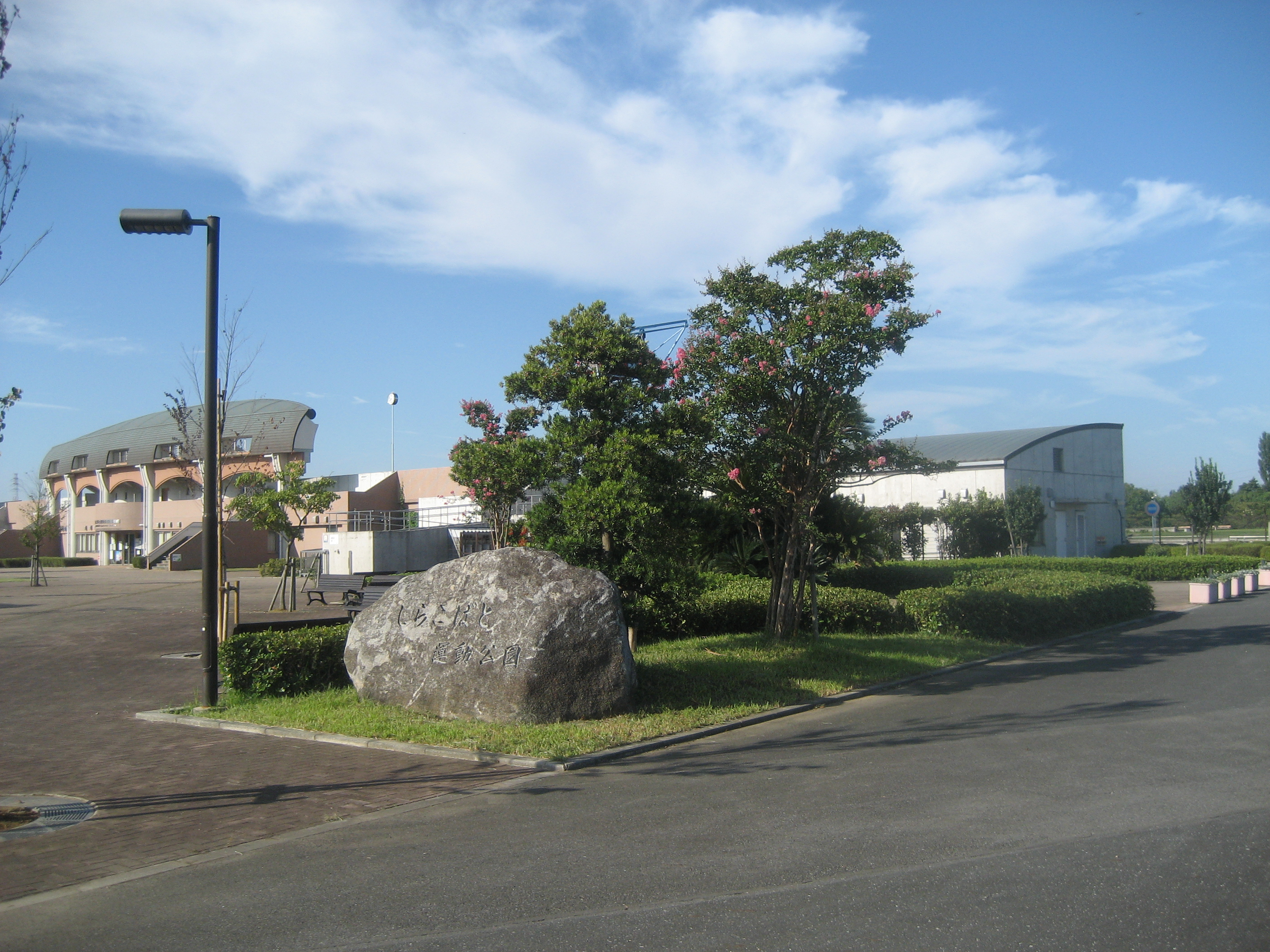 埼玉県越谷市にあるしらこばと運動公園（正面入り口付近）